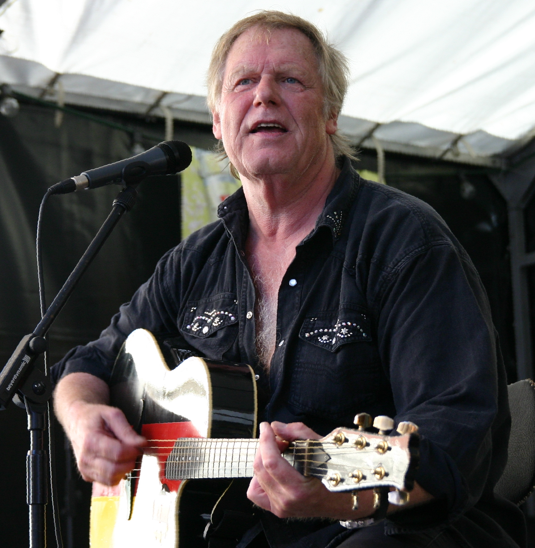 German Country Singer Gunter Gabriel